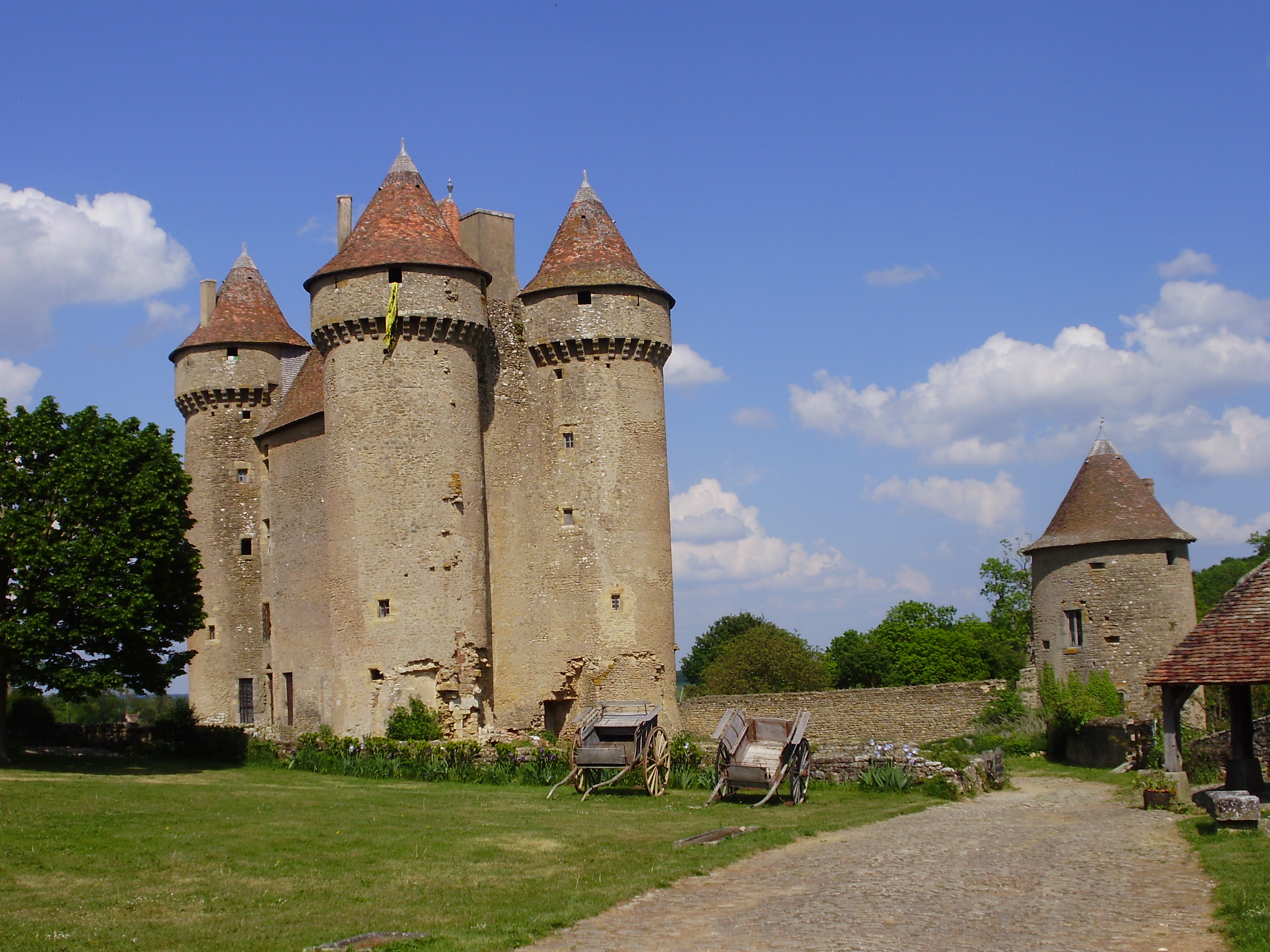 Le château de Sarzay fut une imposante forteresse médiévale comprenant 38 tours et 3 pont-levis.